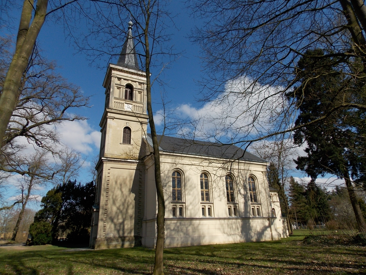 klassizistische Gutskapelle, Gut Melkof